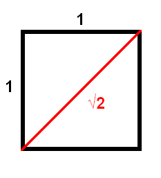 Quadrat mit Wurzel 2